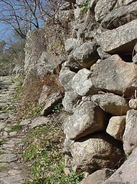 detalle típico de contorno de finca en illano